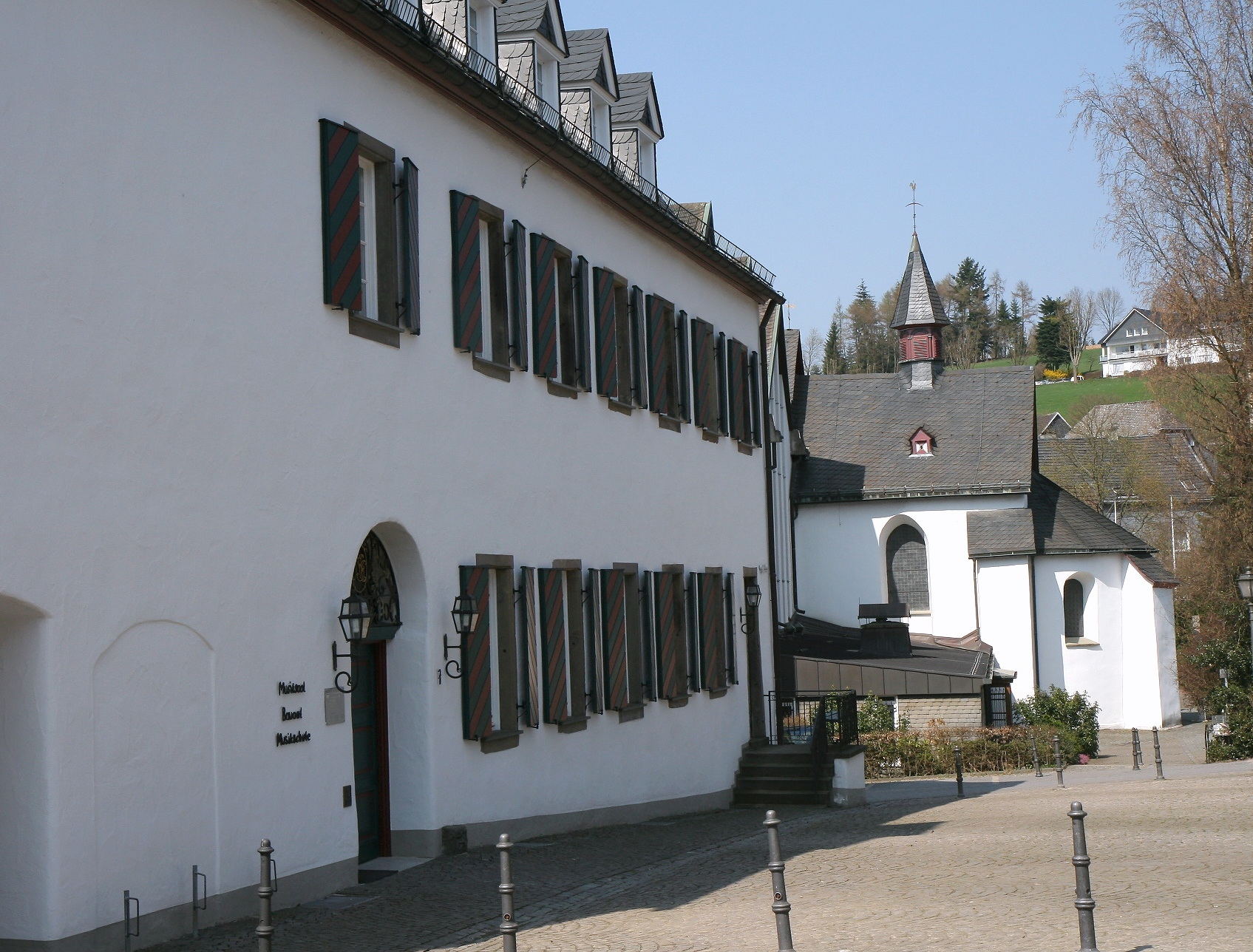 Altes Kloster in Drolshagen. This image shows a heritage building in Germany, located in the North Rhine-Westphalian city Drolshagen (no. 2).